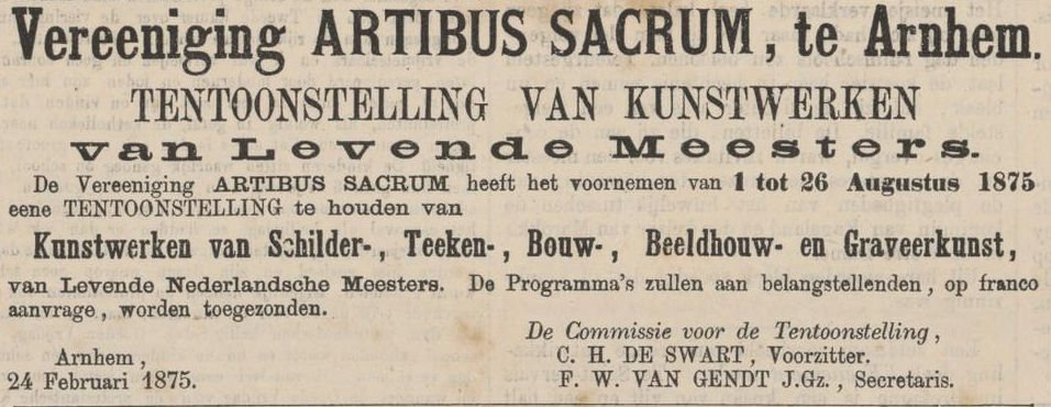 Advertentie tentoonstelling van Levende Meesters (1875) in Arnhem, georganiseerd door Artibus Sacrum.